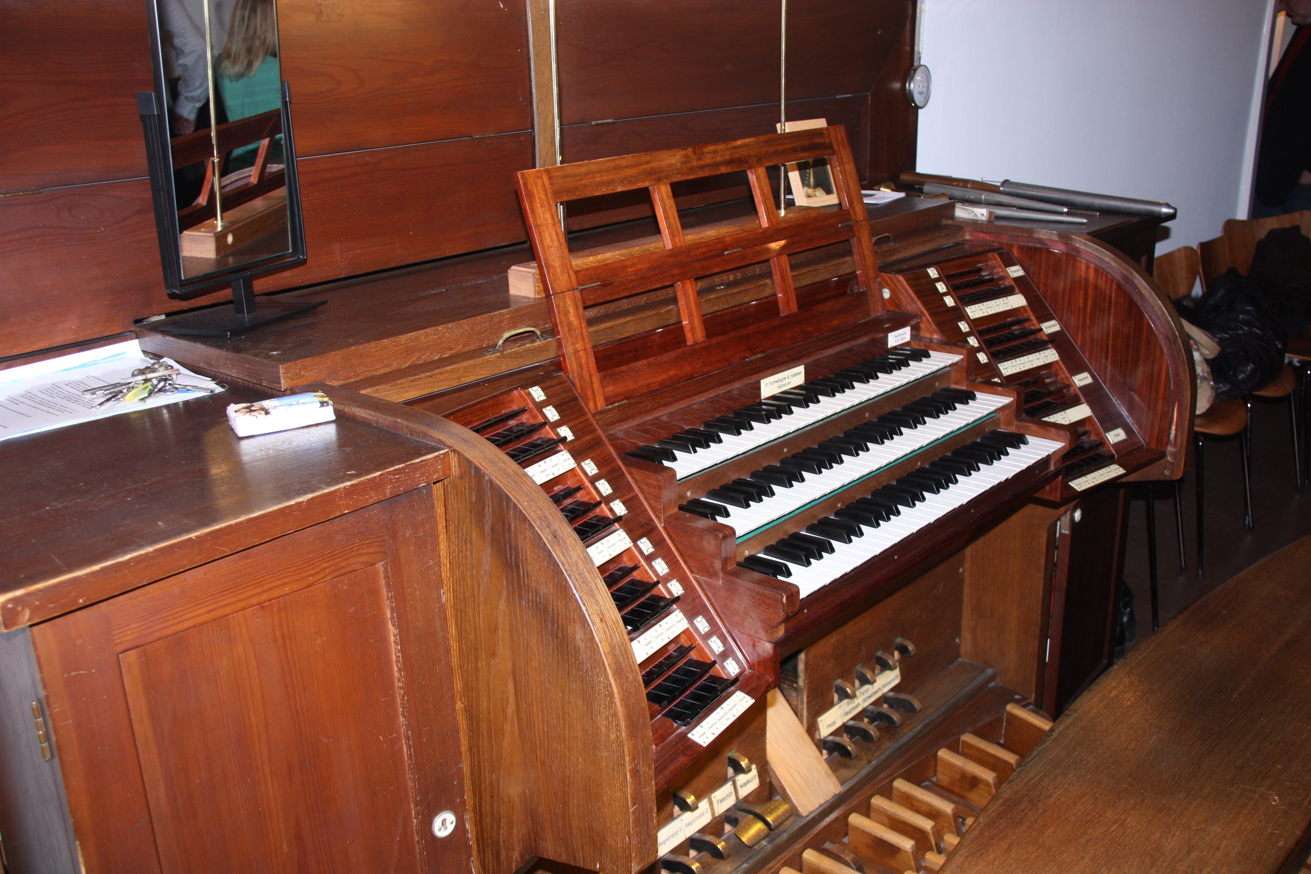 Hamburg-Langenhorn, Ansgarkirche, Orgel, Spieltisch